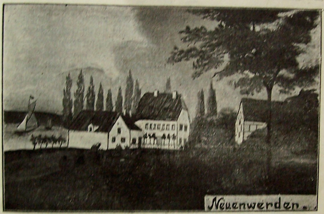 Gut Neuenwerder, bis in das 19. Jahrhundert vor den Toren Rostocks, heute liegt dort die Neue Werderstraße.